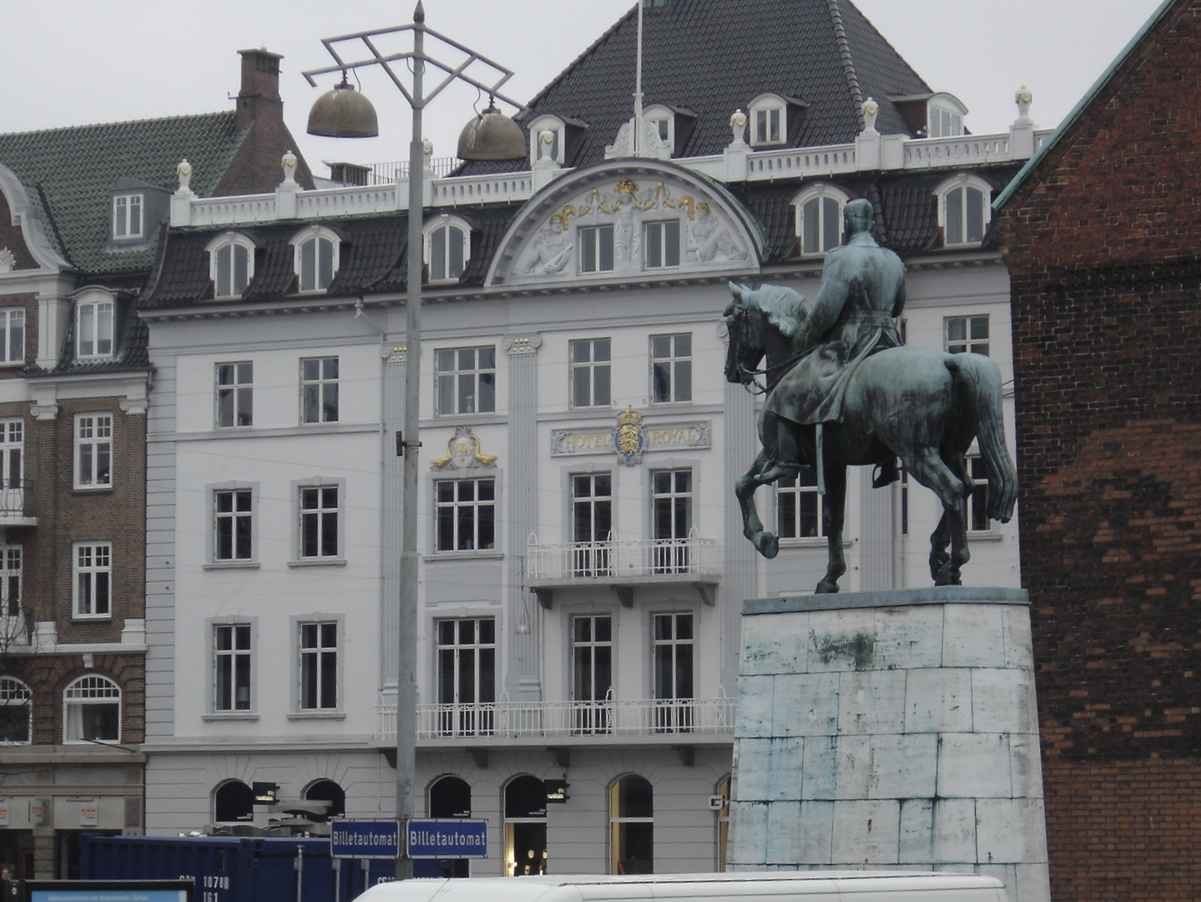 Rytterstatue av Christian X av Danmark i bronse oppstilt ved Bispetorv i Århus i 1955. Kunstner: Helen Schou